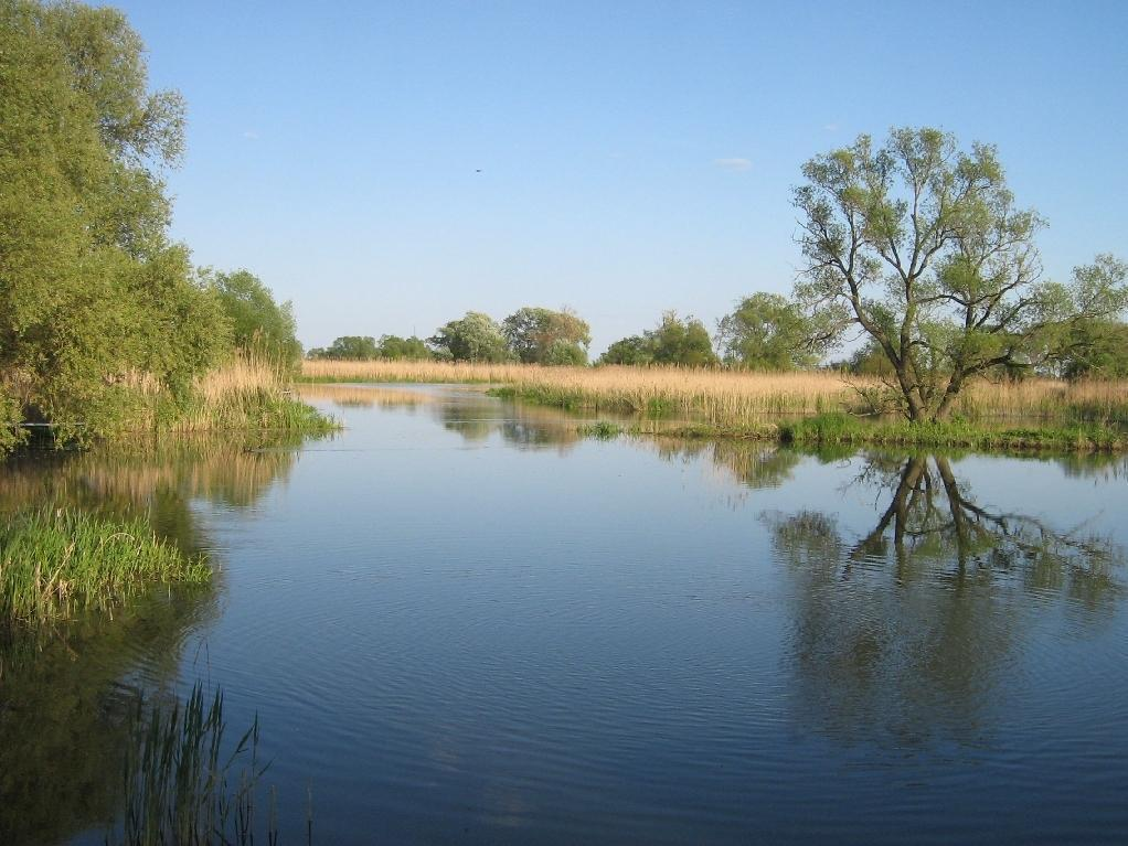 Ein Seitenarm der Havel bei Döberitz (HVL) (Brandenburg, Germany)